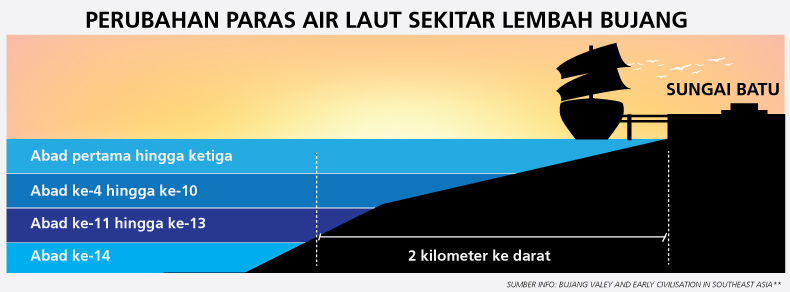 Perubahan paras air laut mengikut zaman